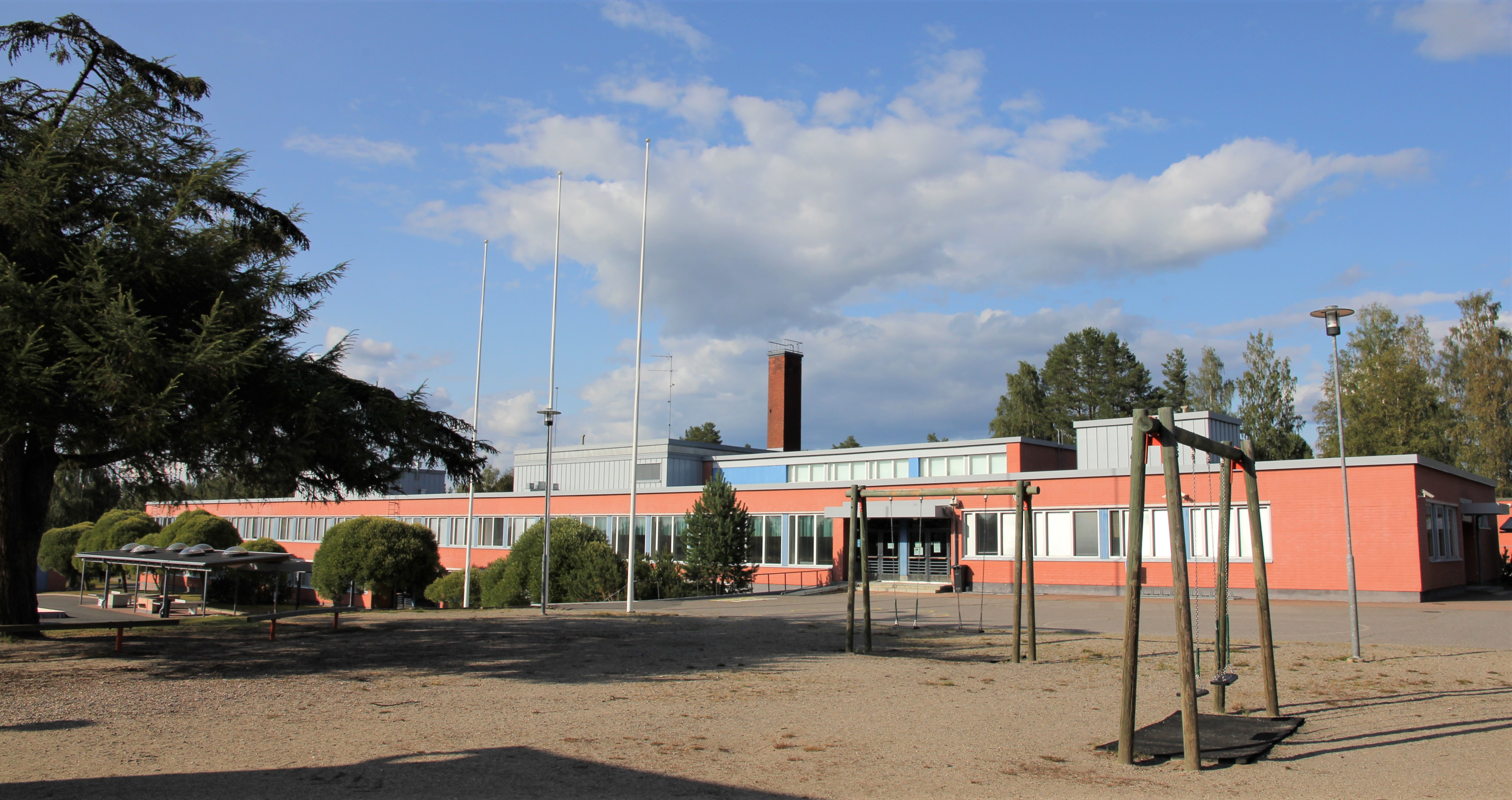 Tuusniemen Turulan koulukeskuksen rakennuksia Tuusniemen kirkonkylällä. Tuusniemen yhtenäiskoulu ja lukio ovat tilojen pääkäyttäjiä. Koulukeskuksen osoite on Keskitie 34-38, Tuusniemi.